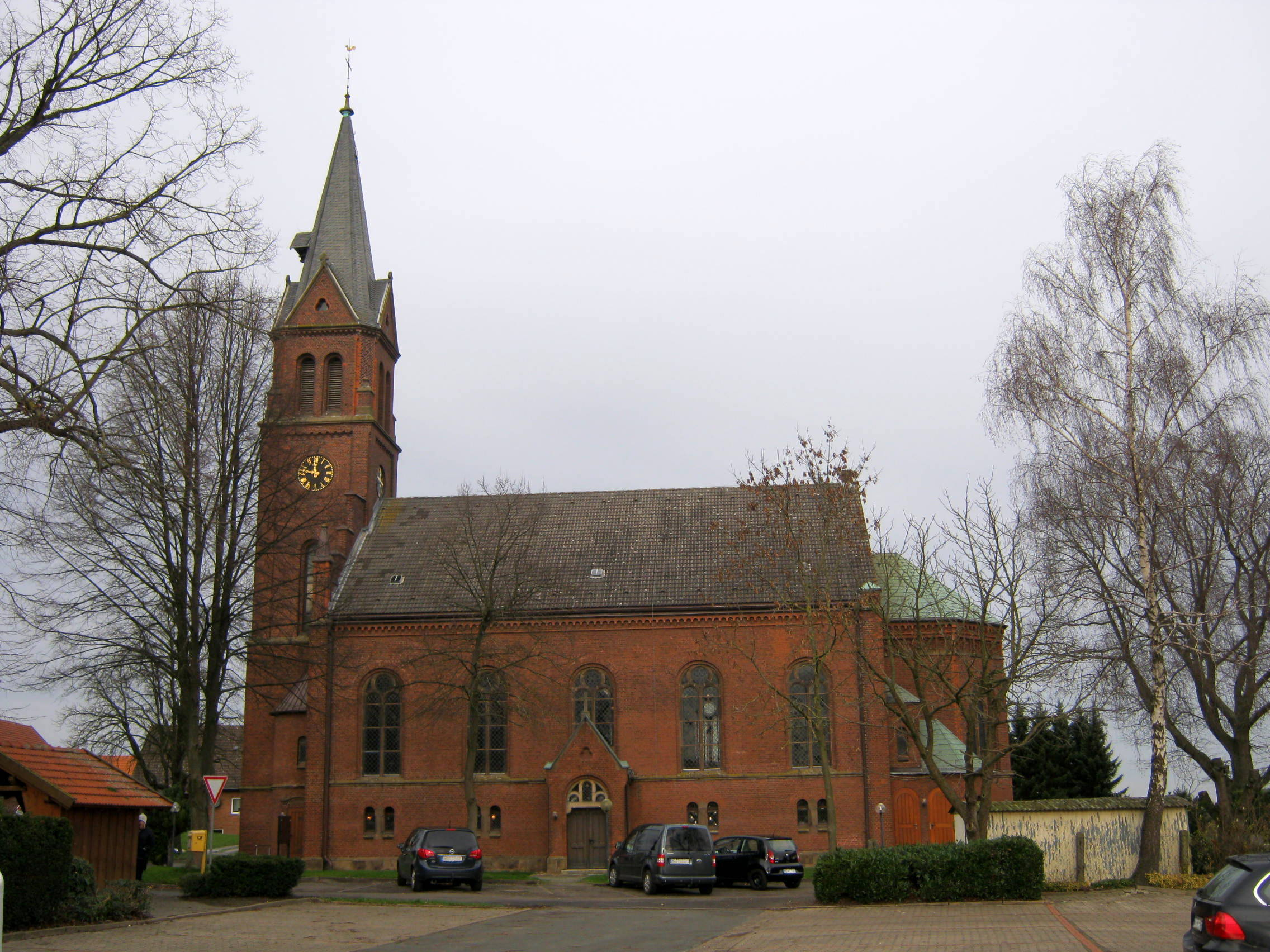 Die neugotische Christuskirche in Isenstedt (Ortschaft der Stadt Espelkamp) aus südlicher Richtung. This image shows a heritage building in Germany, located in the North Rhine-Westphalian city Espelkamp (no. 15).